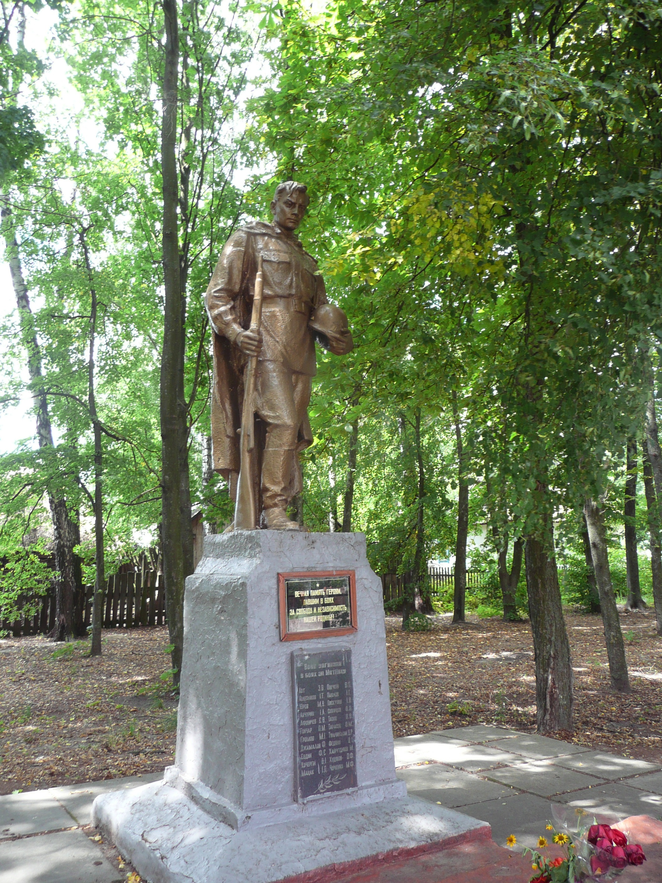 Памятник неідомому солдату на братській могилі у сільському парку с.Матіїки (Бахмацький район)